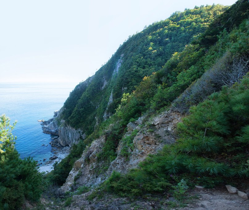 Лазовский государственный природный заповедник им. Л.Г. Капланова, Лазовский район This image is related to the protected area of Russia number 2500117